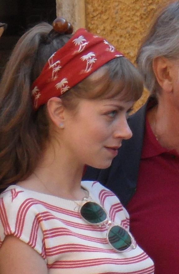 Alice Dwyer, Dreharbeiten zu Let’s go